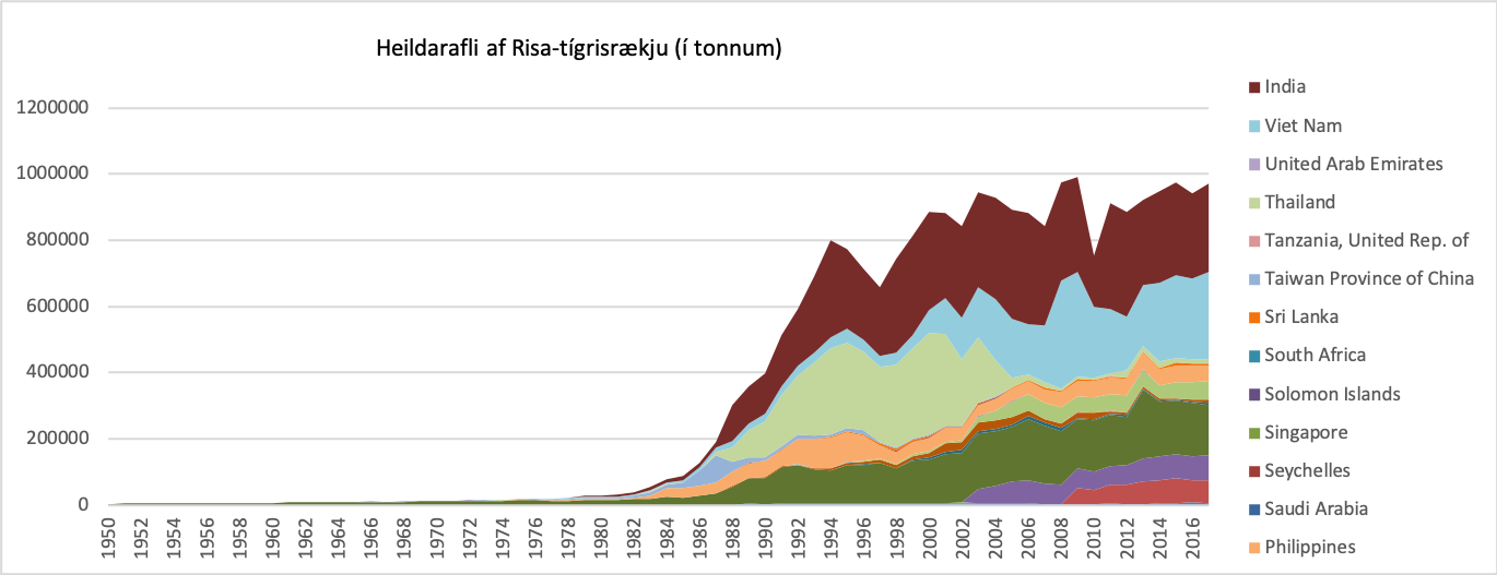 Heildarafli risatígrisrækja